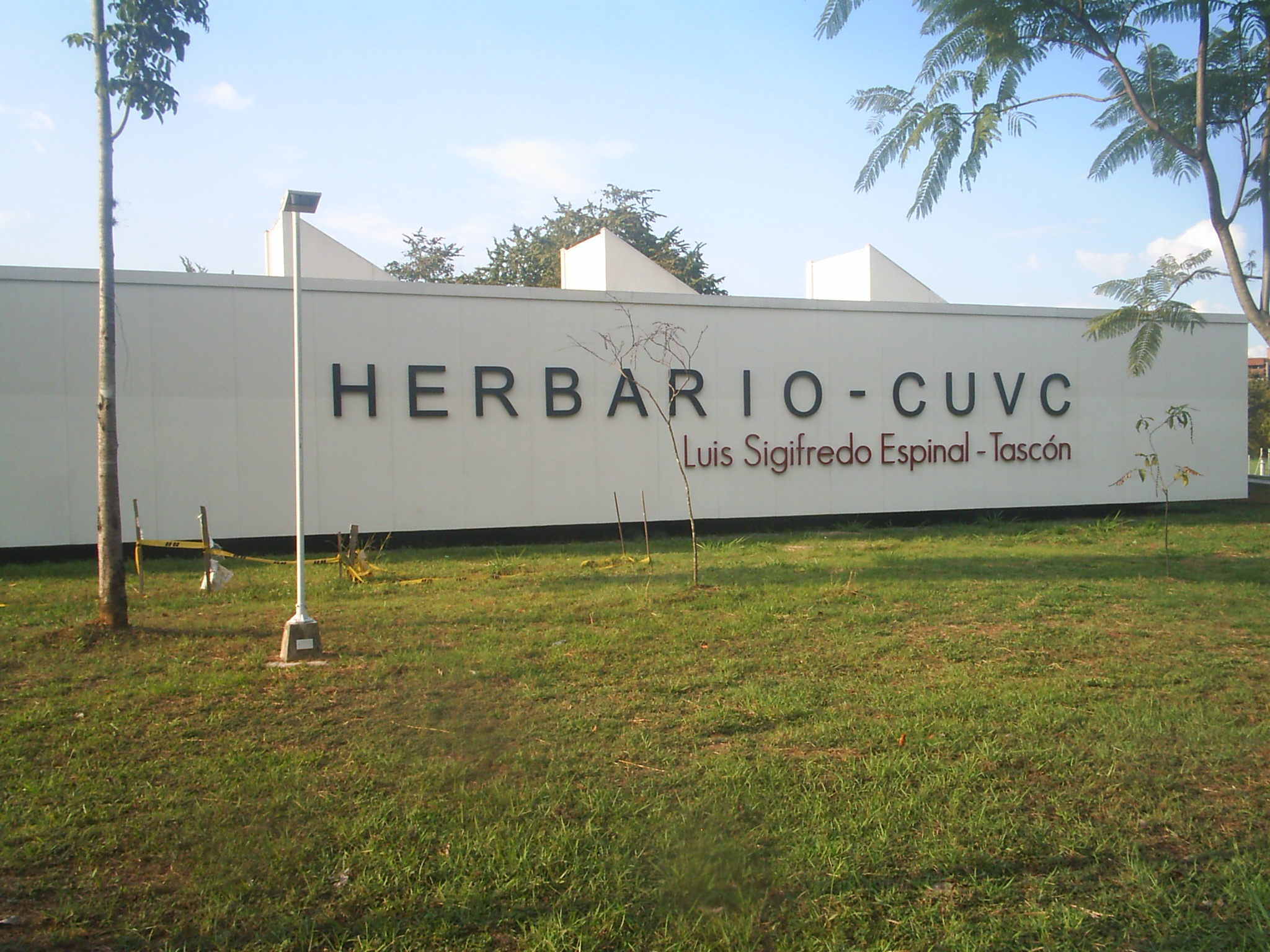 Herbario Luis Sigifredo Espinal TascónEsperanto: Sekplantaro Luis Siĥifredo Espinal TaskonBikol Central: Luis Sigifredo Espinal Tascón Hermarium